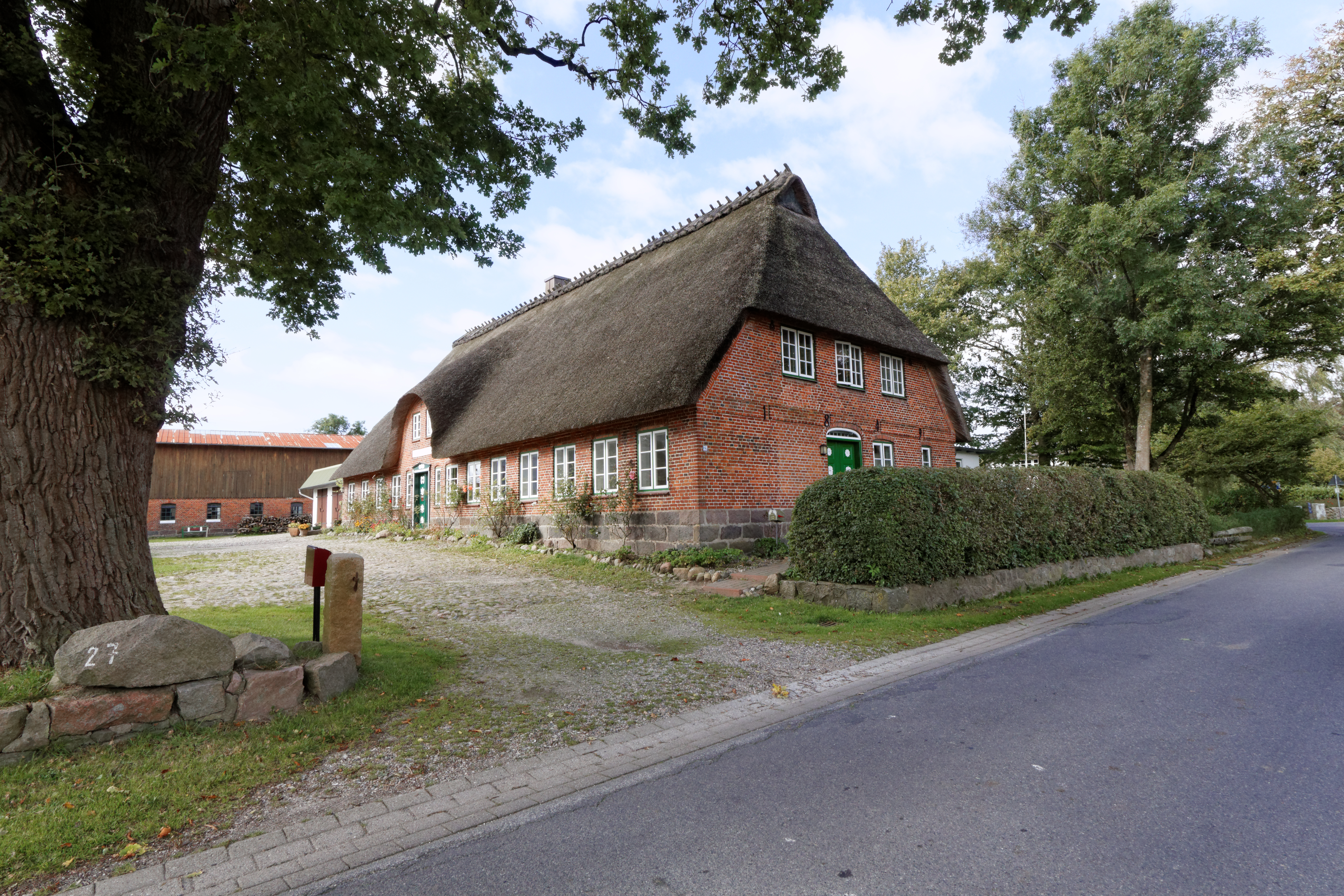 Husby-Gremmerup, Dorfstr. 27